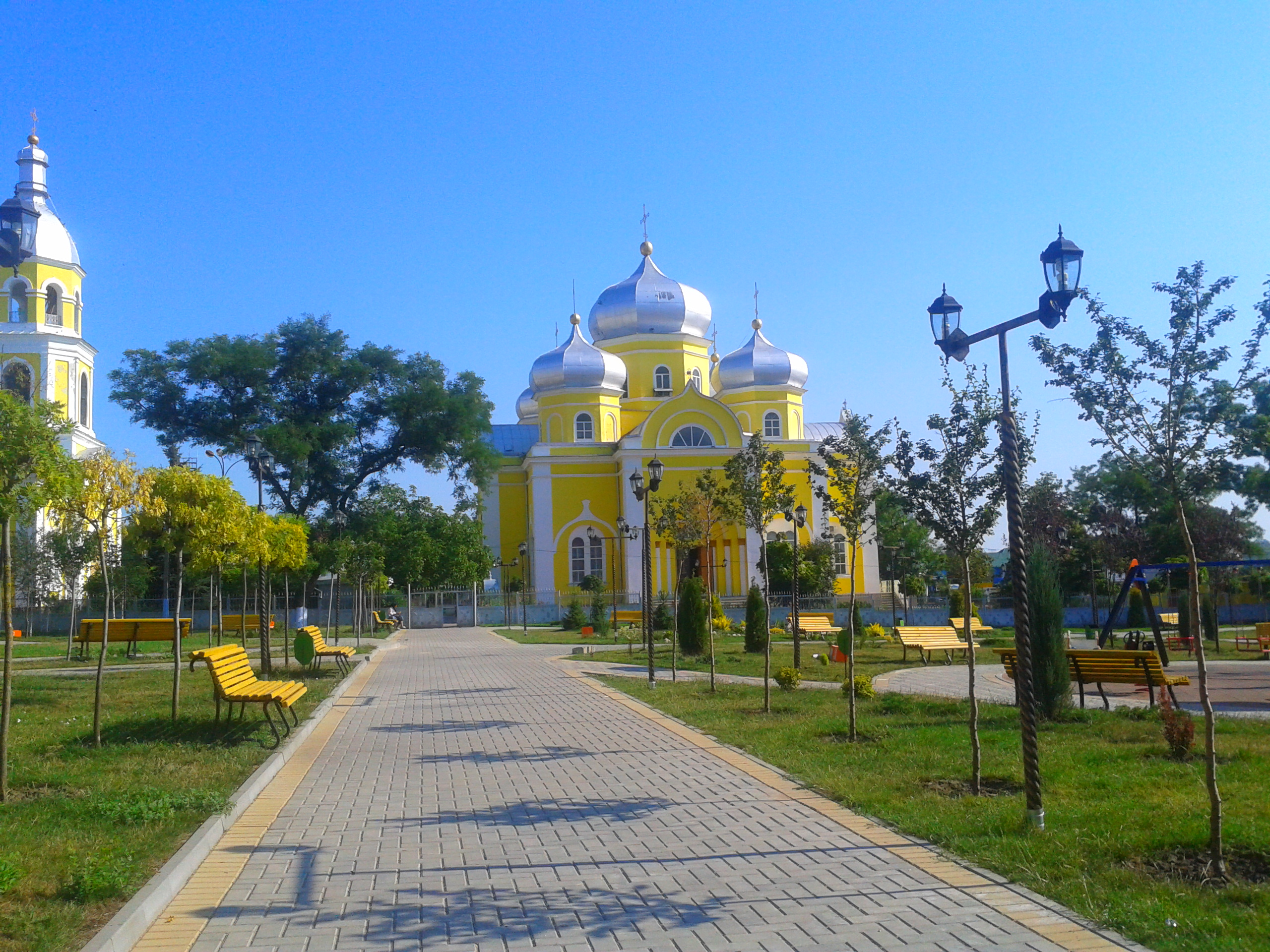 Центральный парк Комрата